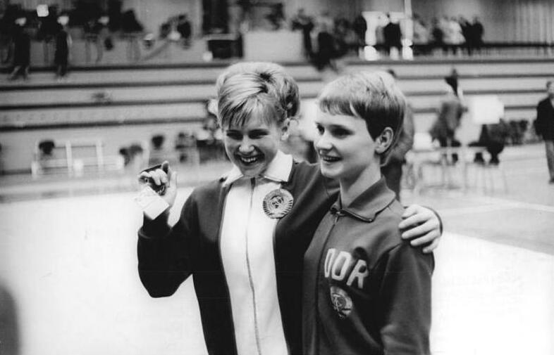 Zentralbild-Koch-Wen-19.5.1969-Landskrona-Schweden: Turn-Europameisterschaften der Frauen. Karin Janz (DDR, rechts) erkämpfte sich den Titel im Sprung, Stufenbarren, am Schwebebalken und im Mehrkampf, stellt sich hier mit der sowjetischen Turnerin Olga Karasjowa (Goldmedaille im Bodenturnen) den Fotografen.